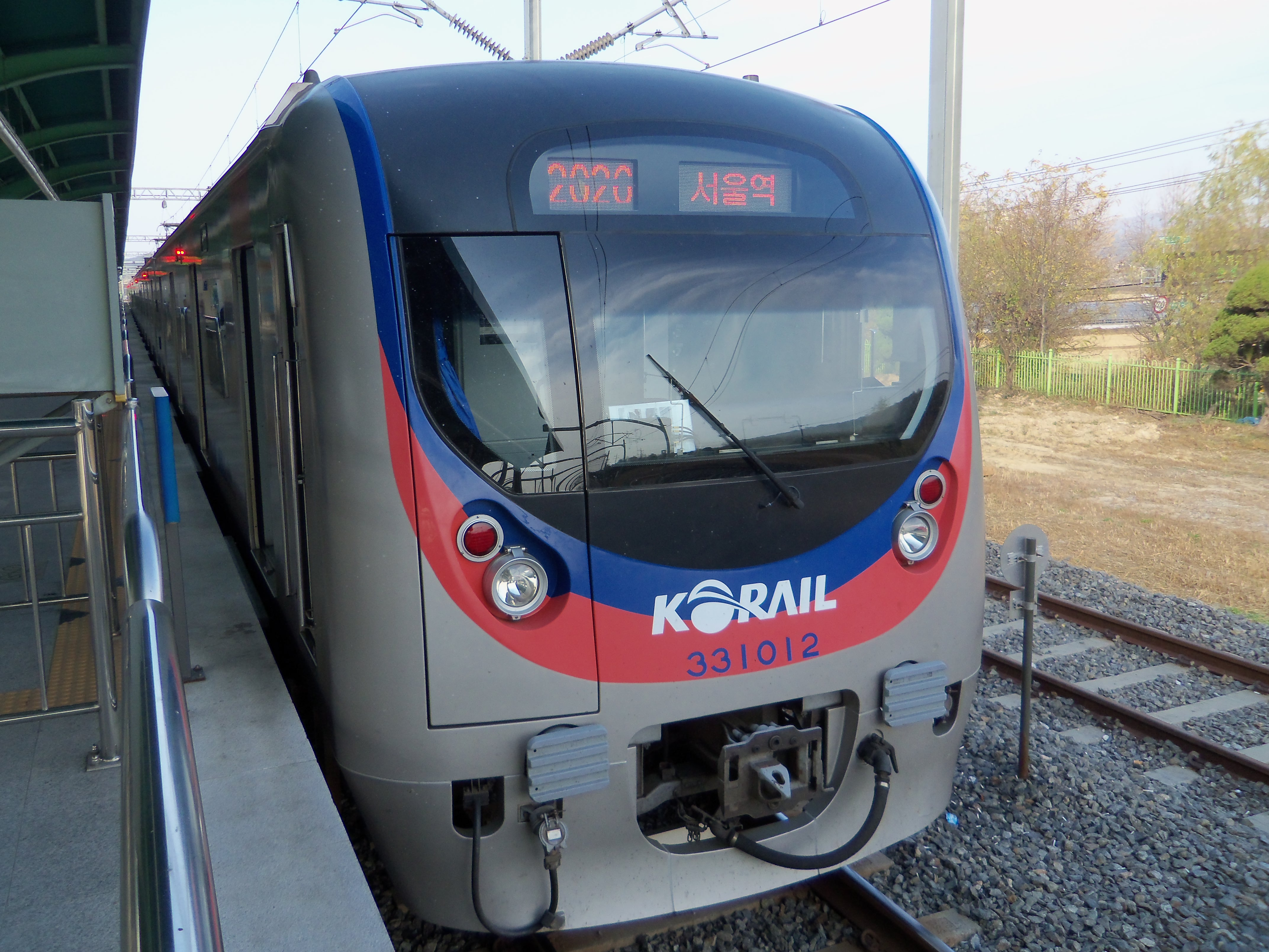 문산역 대기중인 33112편성